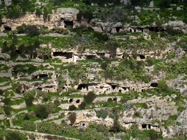 Provincia de Scicli en la isla de Sicilia - Italia 2010